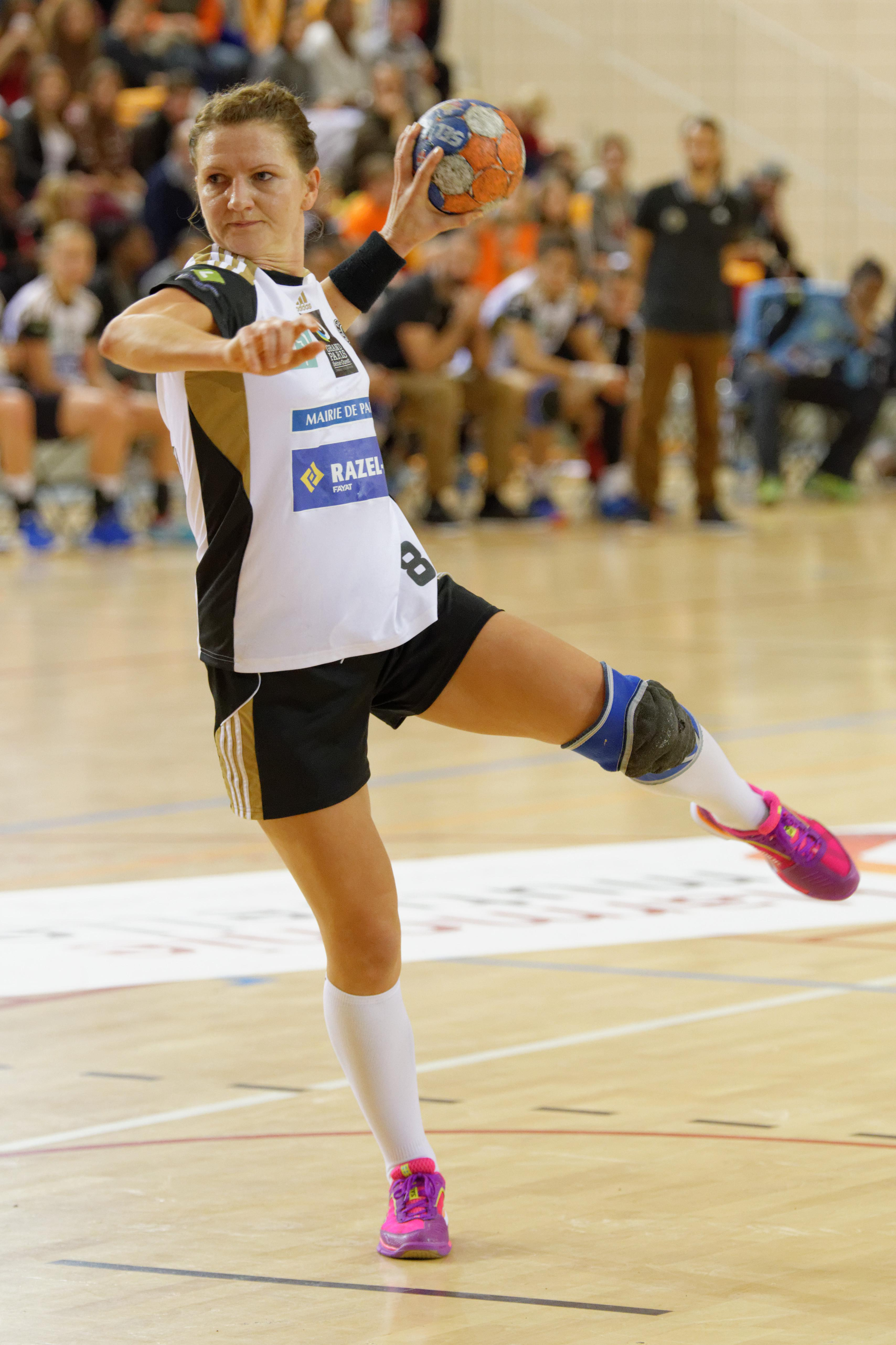 IPH-BSV-22NOV2015-022-Karolina_Zalewski